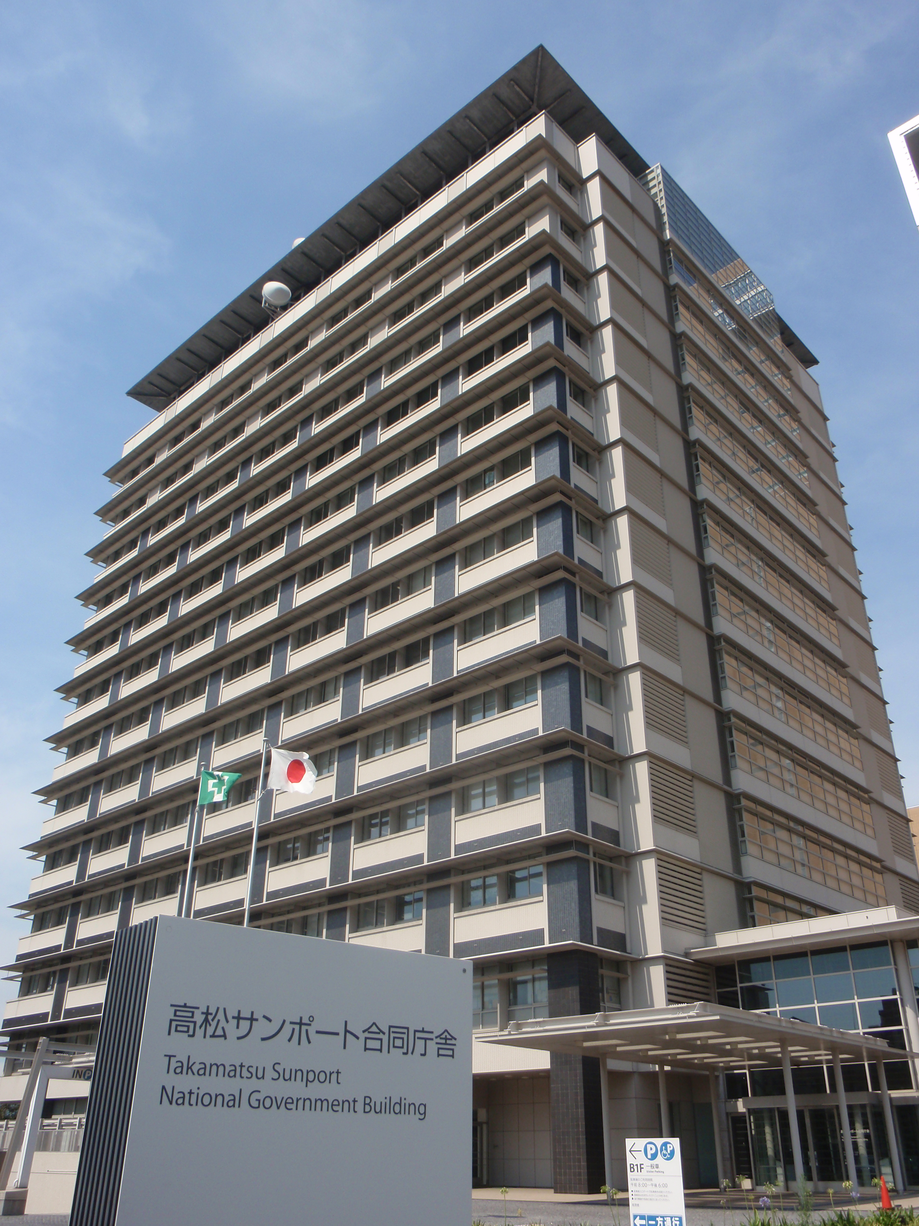 高松サンポート合同庁舎